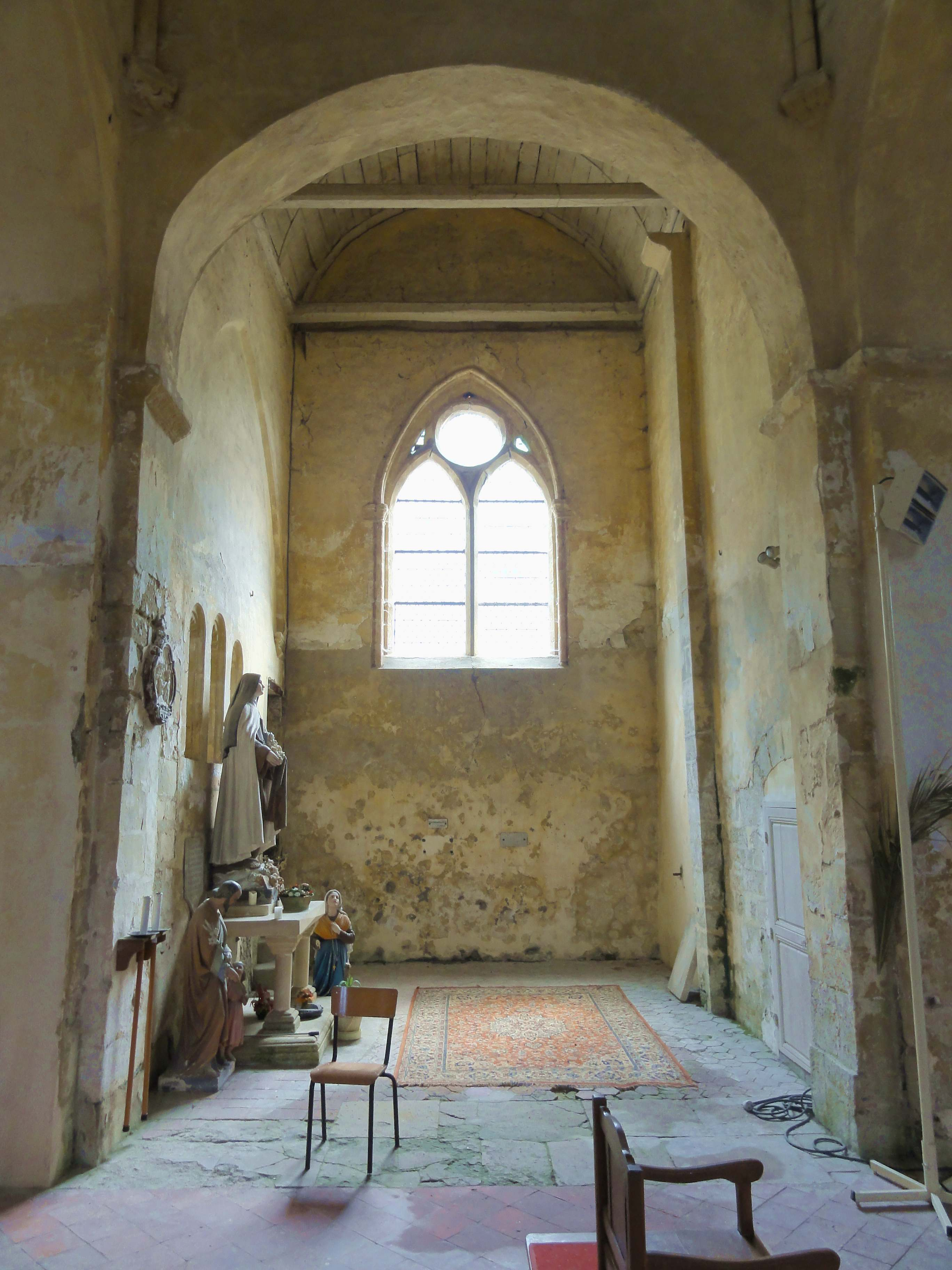 Intérieur de l'église (voir titre).